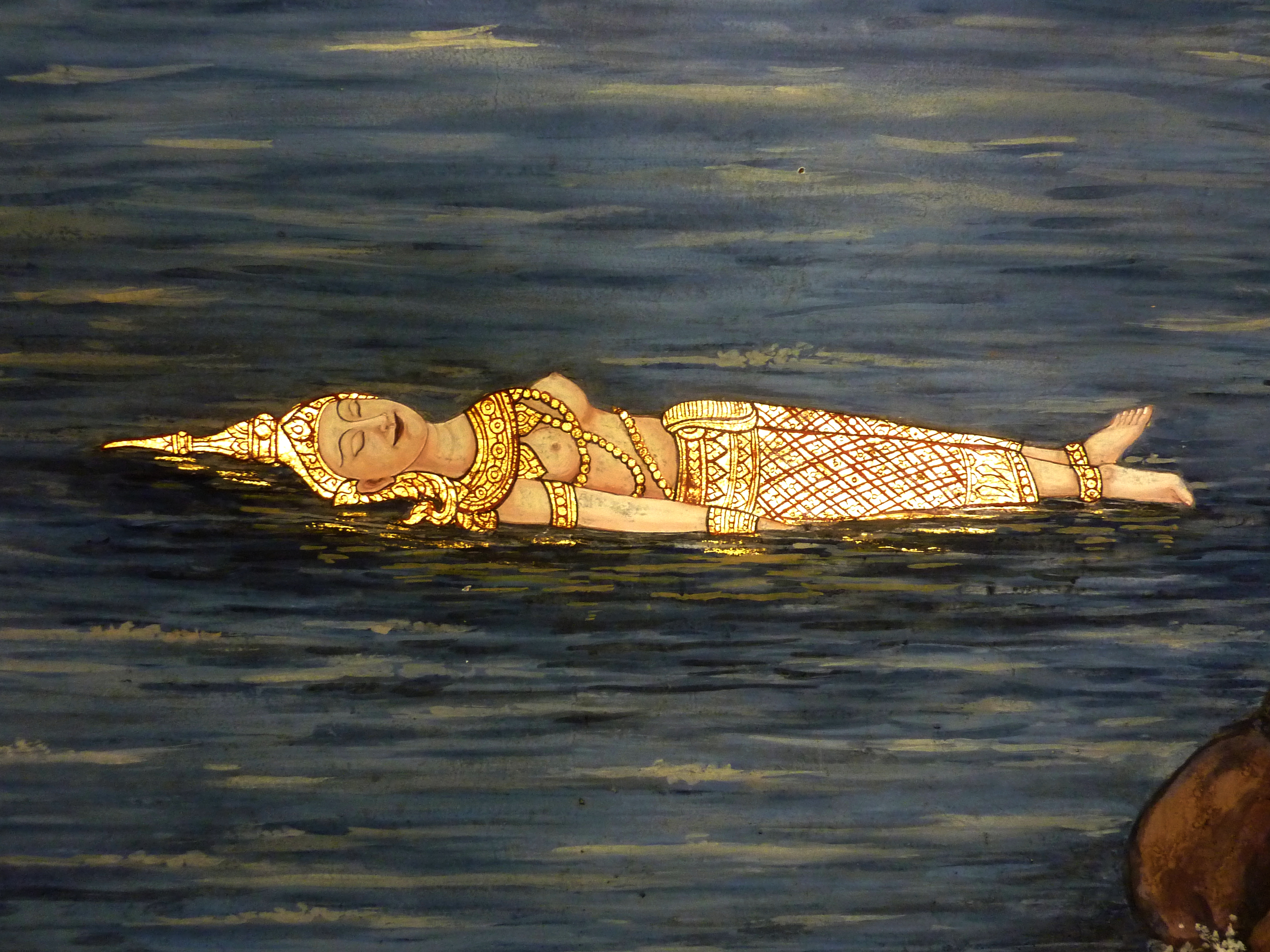 Wat Phra Kaew, Bangkok